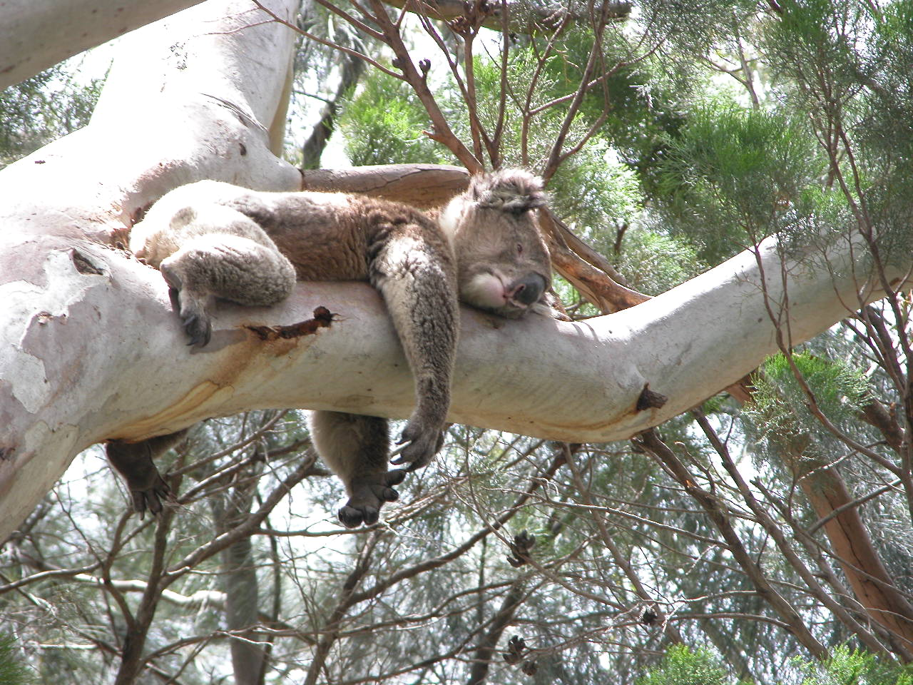 Koala